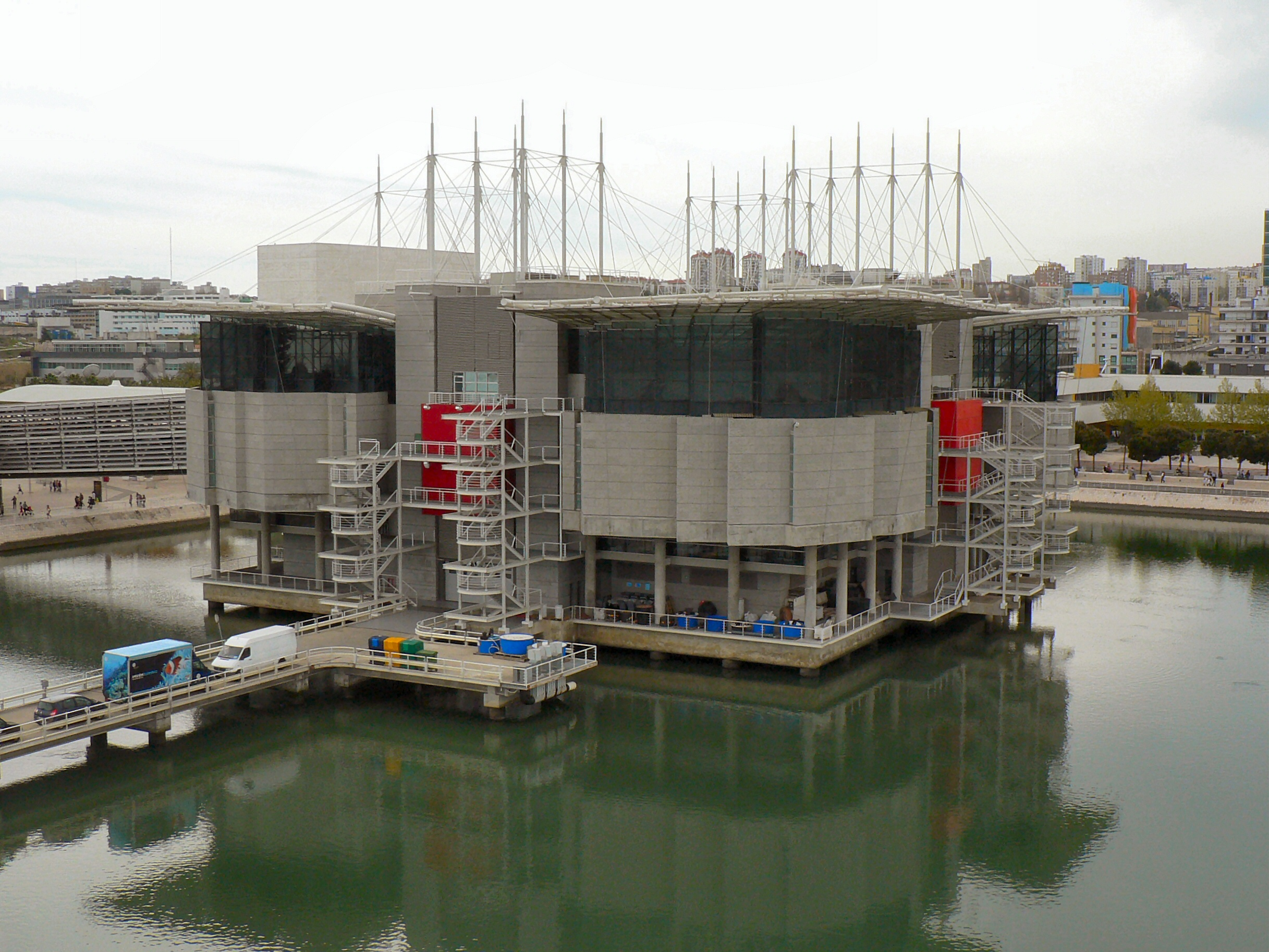 Oceanário no Parque das Nações em Lisboa (Vista do teleférico)